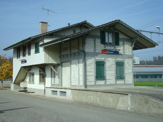 Historisches Stationsgebäude Bannwil der Aare Seeland mobil (ASm) auf der Strecke Langenthal - Niederbipp (- Oensingen) mit Baujahr 1907.